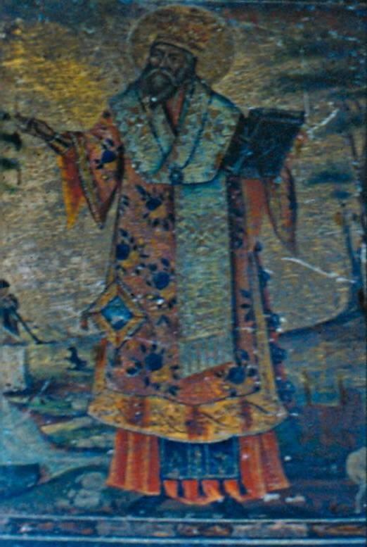 Νικόλαος Αδριανουπολίτης, Άγιος Μόδεστος, 1860, Νέα Παναγία, Θεσσαλονίκη